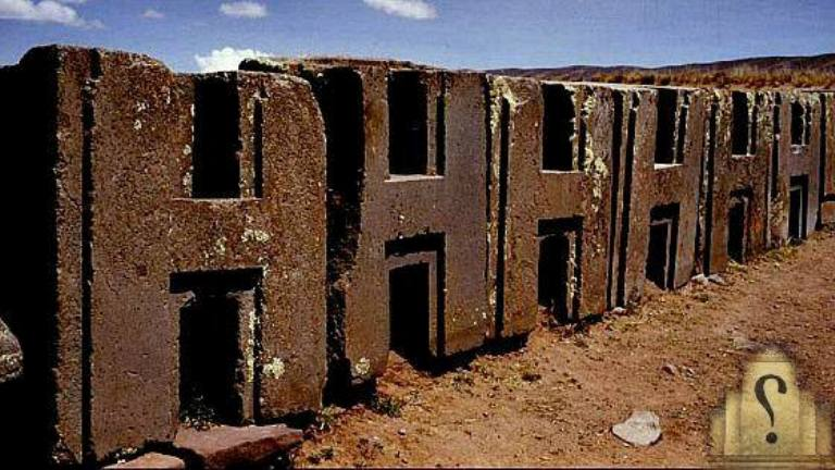 dd